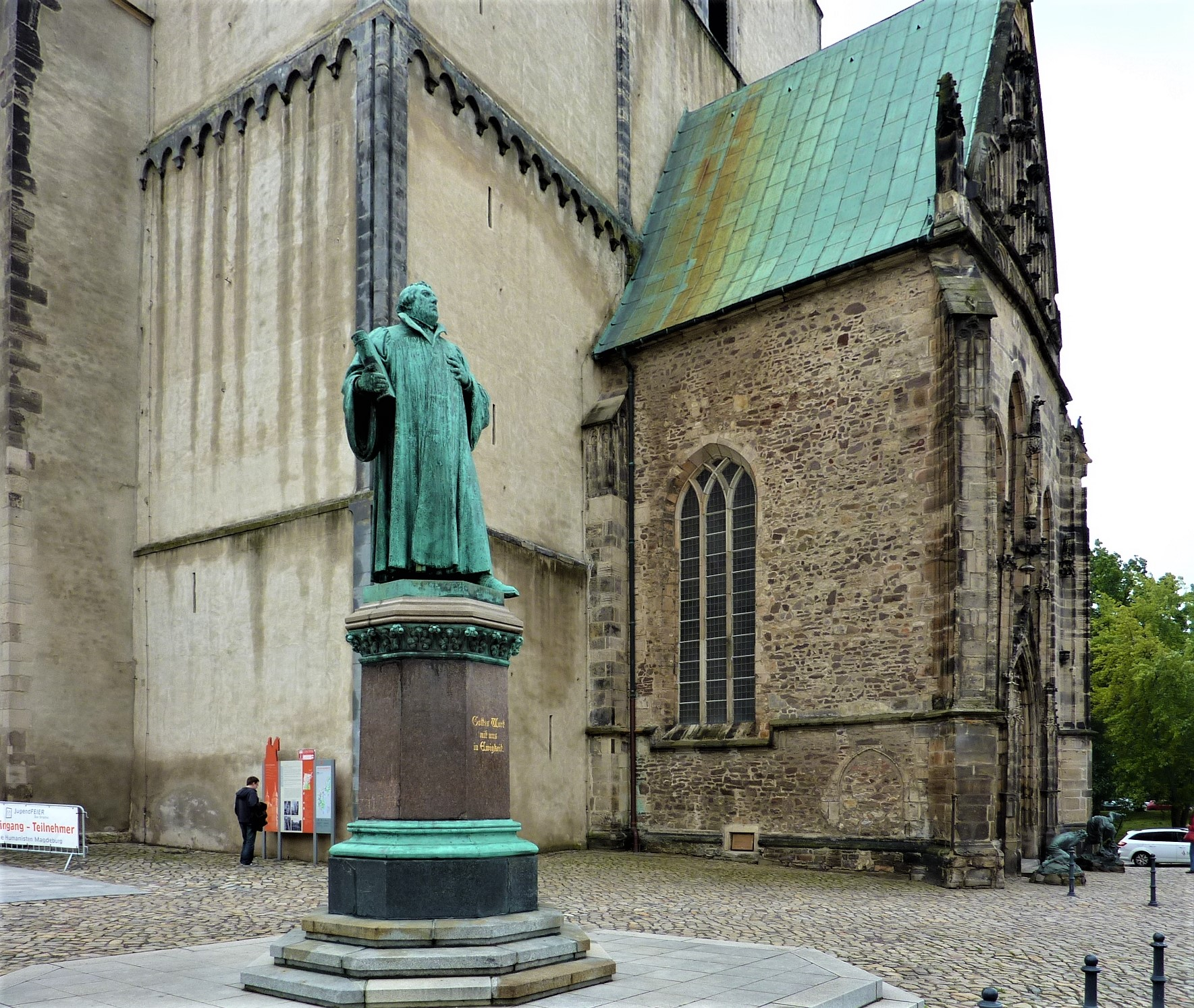 Lutherdenkmal Magdeburg